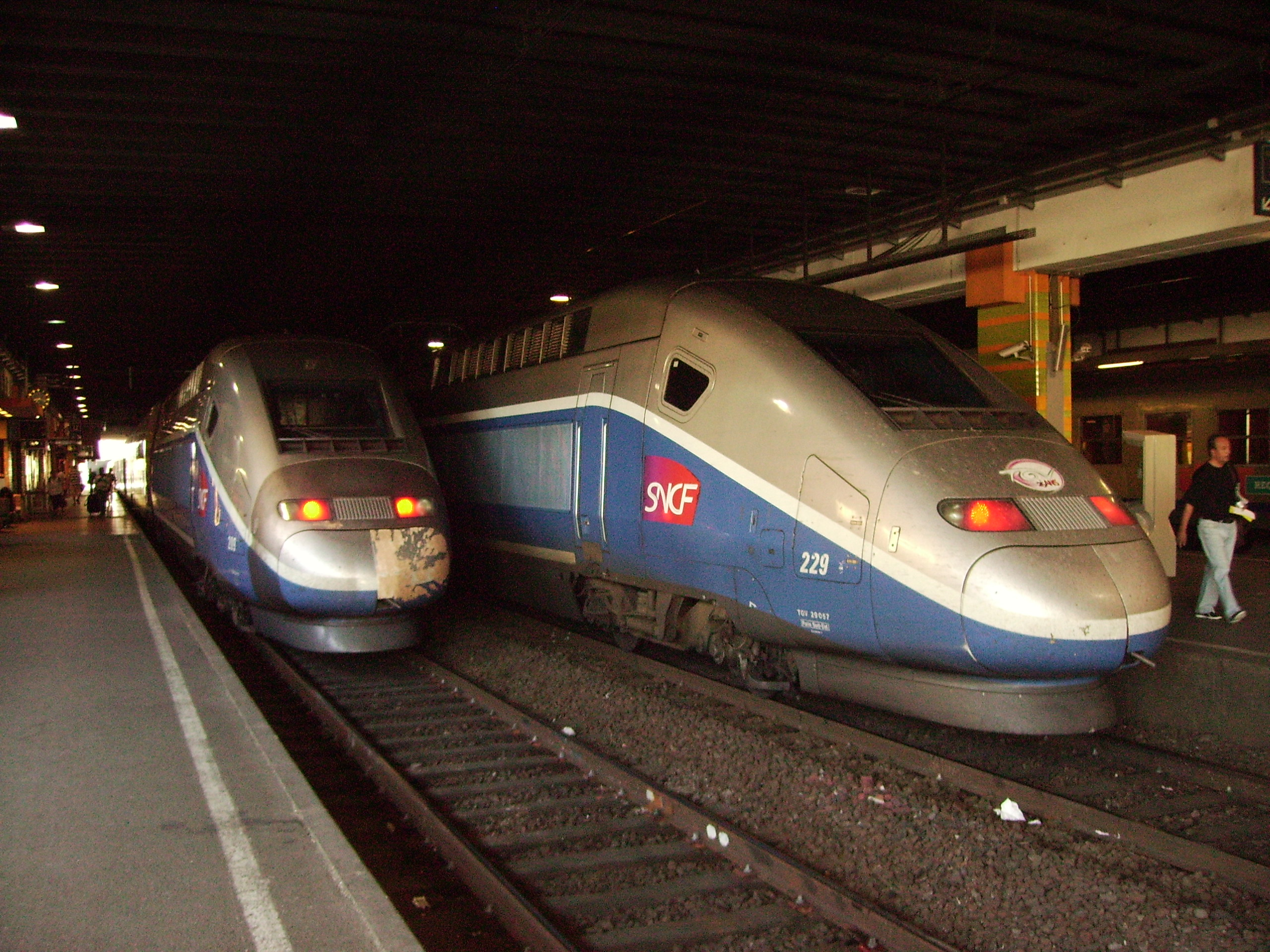 Deux TGV Duplex en gare de Montpellier.